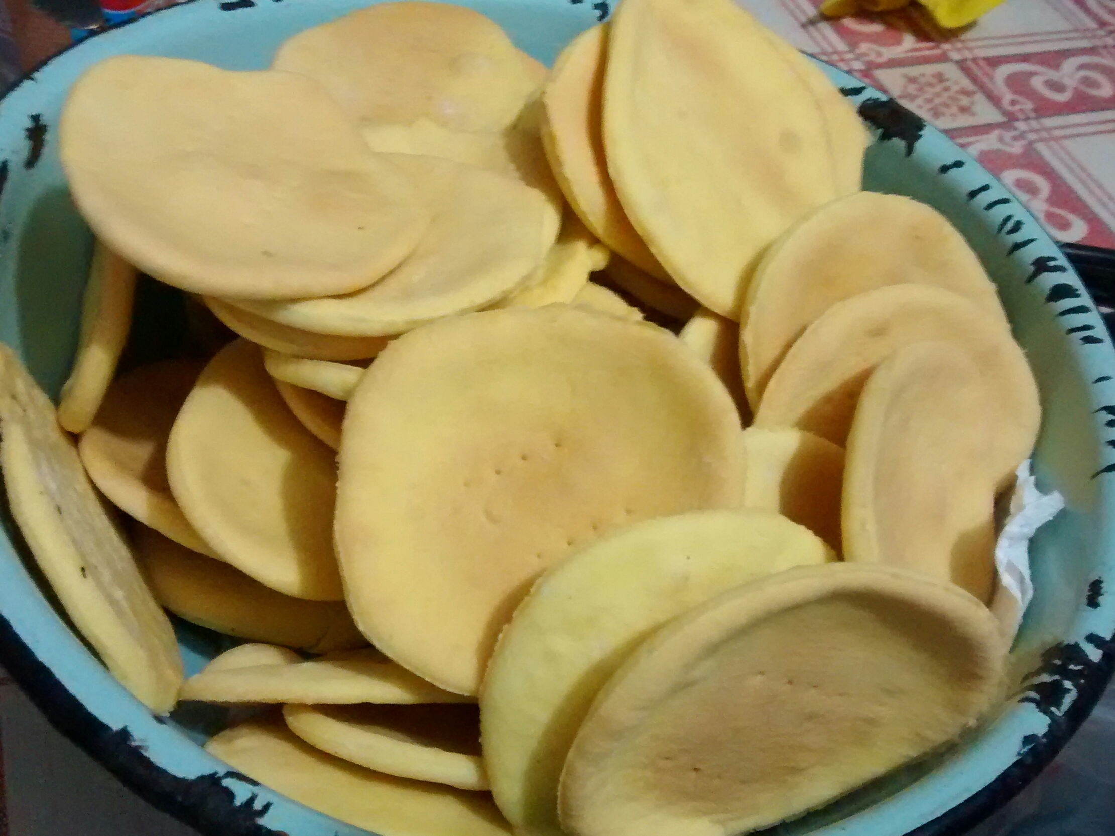 Hojarascas caseras para preparar alfajores en las Fiestas Patrias de Chile. Típicamente se rellenan con chancaca o manjar y se empolvorean en coco rallado.